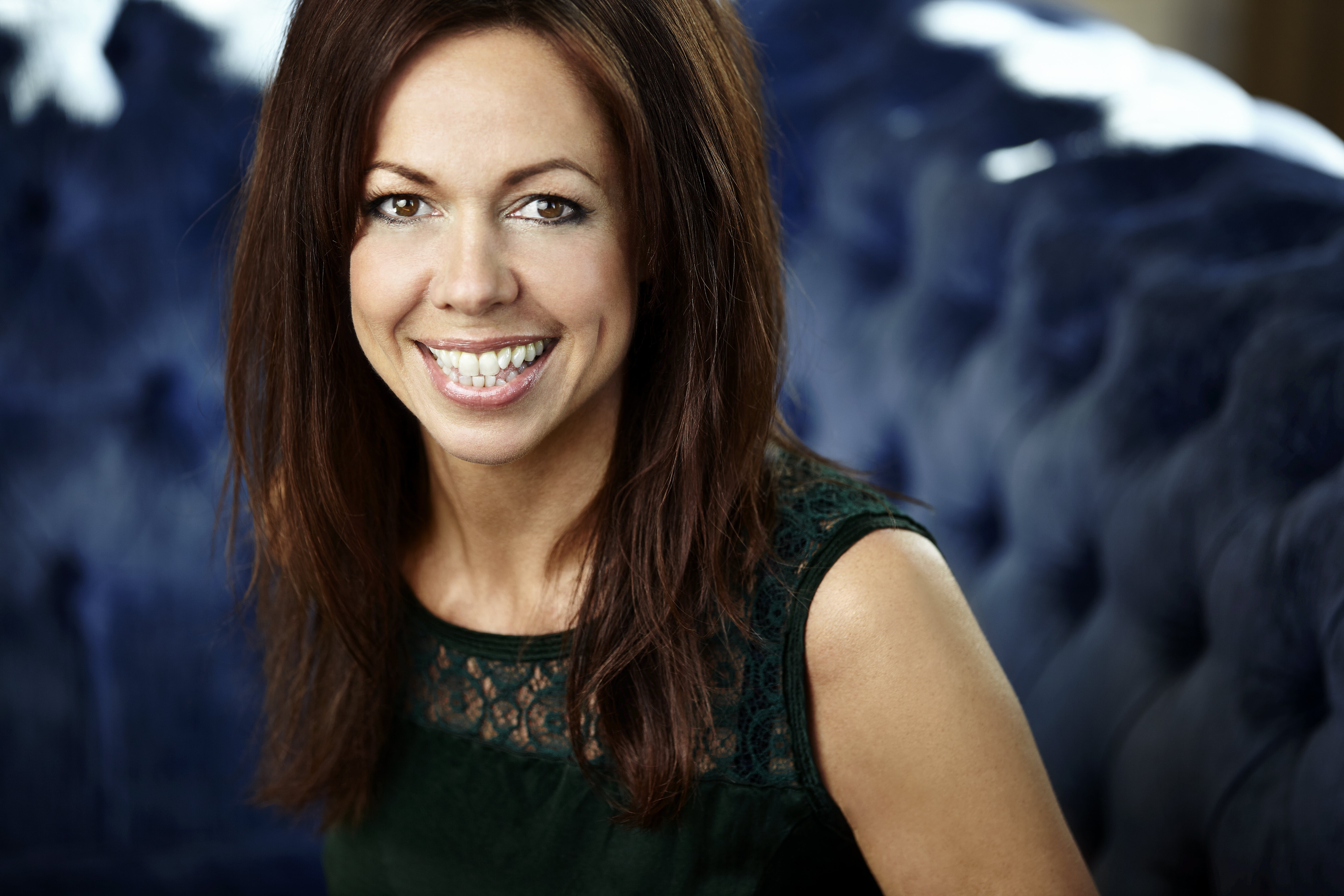 Jazzsångerskan Rigmor Gustafsson.